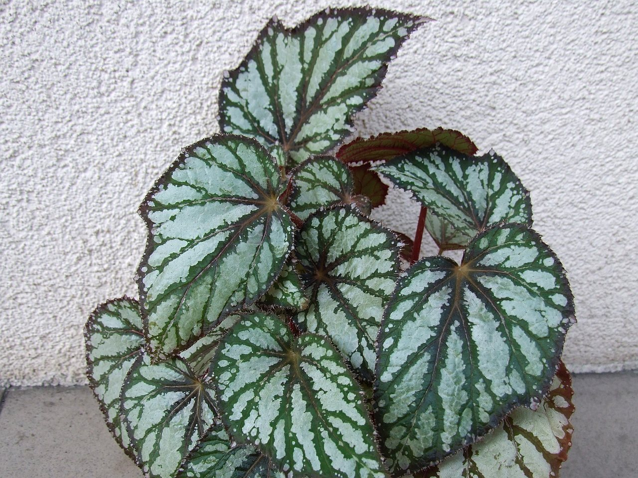 Begonia rex